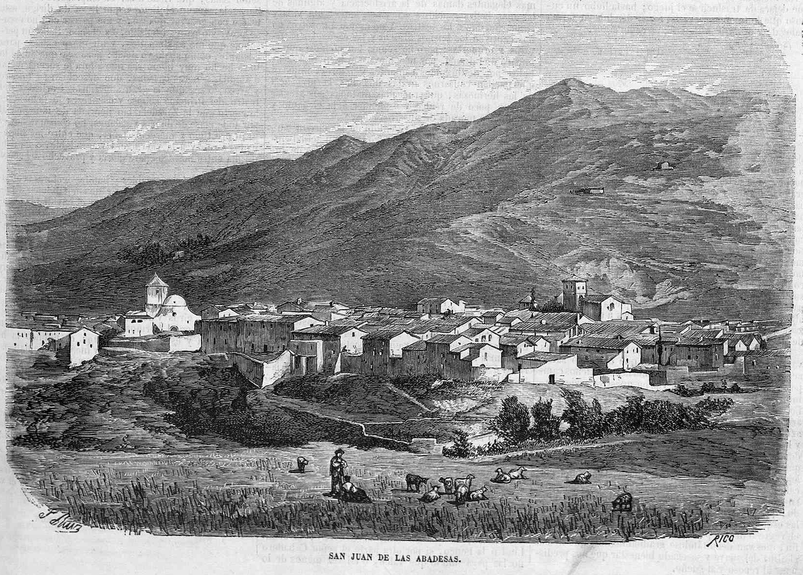 San Juan de las Abadesas, en la revista española El Museo Universal.